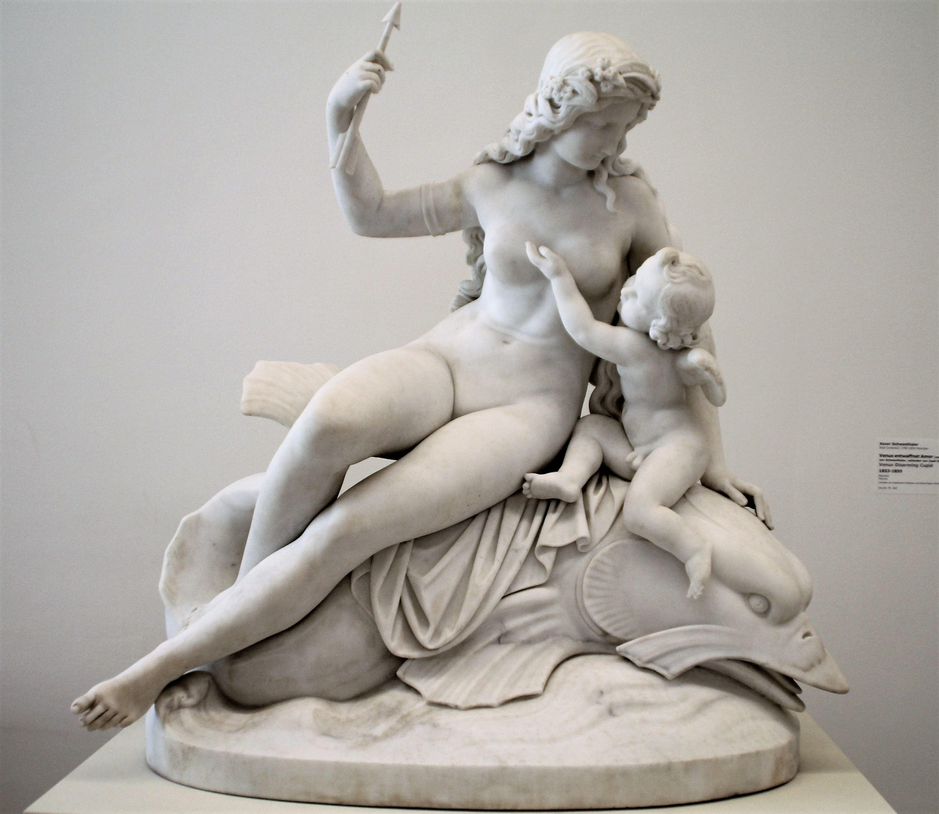 Venus entwaffnet Amor, 1853-1855, Xaver Schwanthaler. Staatsgalerie Stuttgart, Leihgabe der Staatlichen Schlösser und Gärten Baden-Württemberg seit 2010.